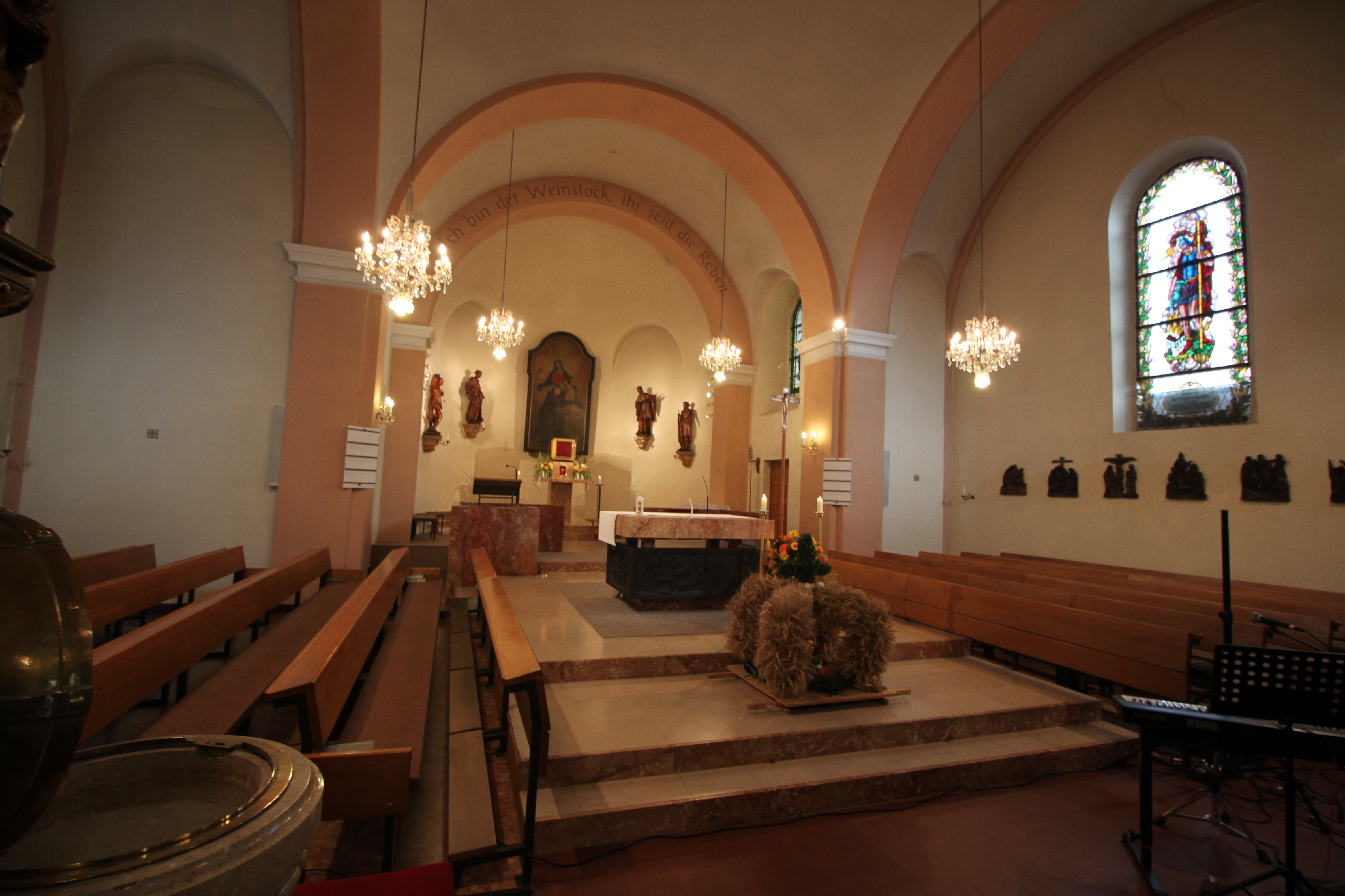 Kath. Pfarrkirche hl. Antonius von Padua, Kircheninneres, im Langhaus zum Chor, ins Langhaus vorgezogener Volksaltar, auf dreistufigem Podest